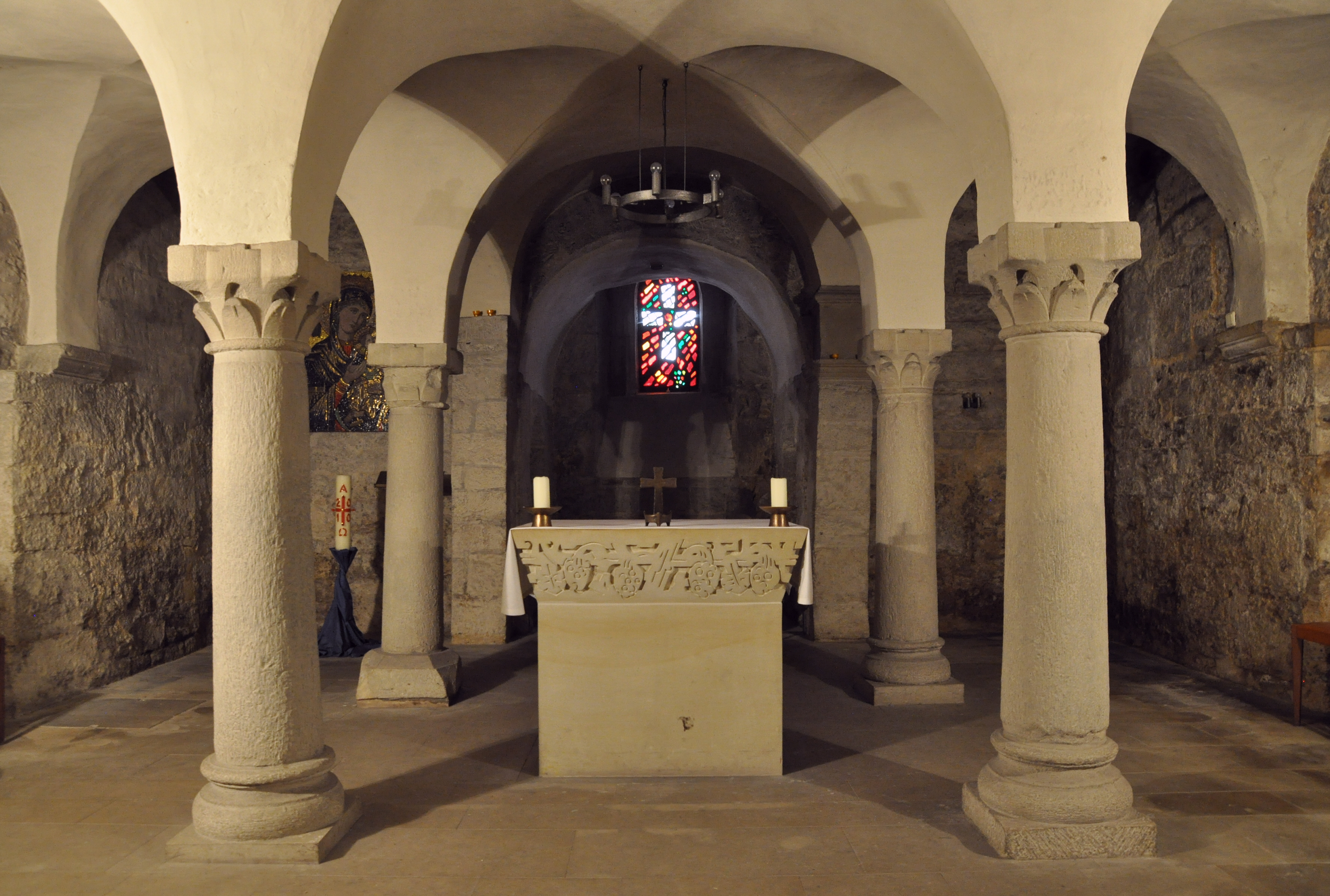 Krypta nach Osten